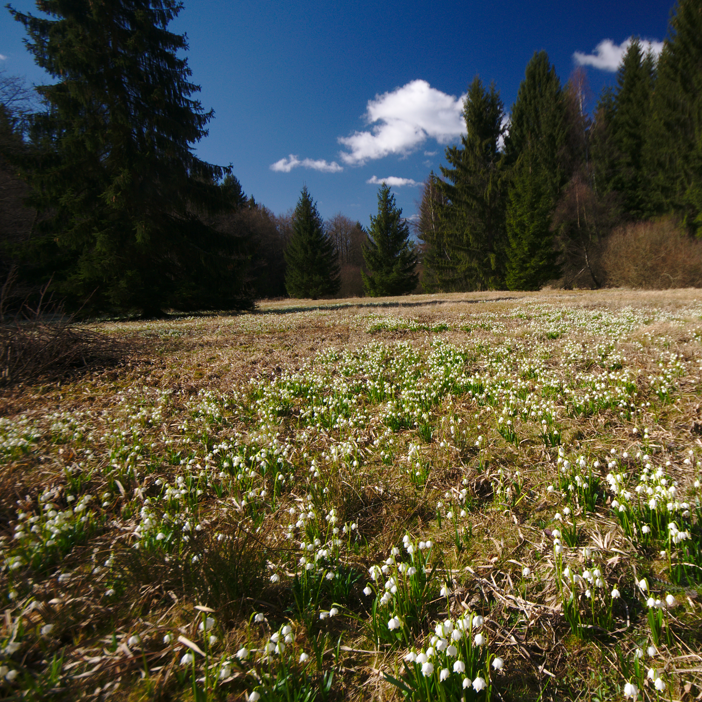 Přírodní rezervace Ploník, okres Blansko